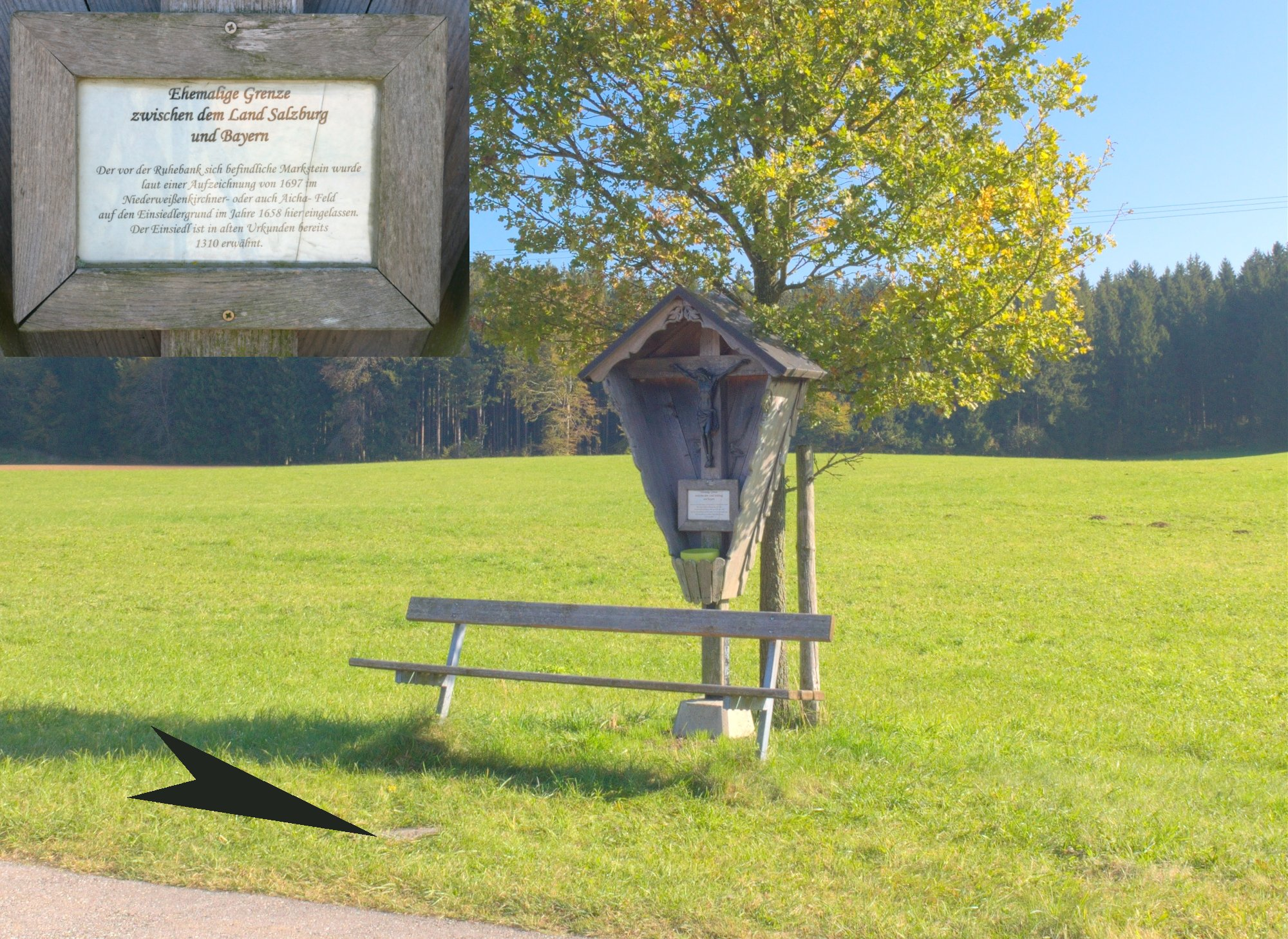 Grenzstein in der Nähe des Hofes "Einsiedl" - Gemeinde Palling - aus dem Jahr 1658, ehemalige Grenze zwischen dem Land Salzburg (Erzstift Salzburg) und Bayern. Text der Tafel... "Der vor der Ruhebank sich befindliche Markstein wurde laut einer Aufzeichnung von 1697 im Niederweißenkirchner oder auch Aicha- Feld auf den Einsiedlergrund im Jahr 1658 hier eingelassen. Der Einsiedl ist in alten Urkunden bereits 1310 erwähnt."